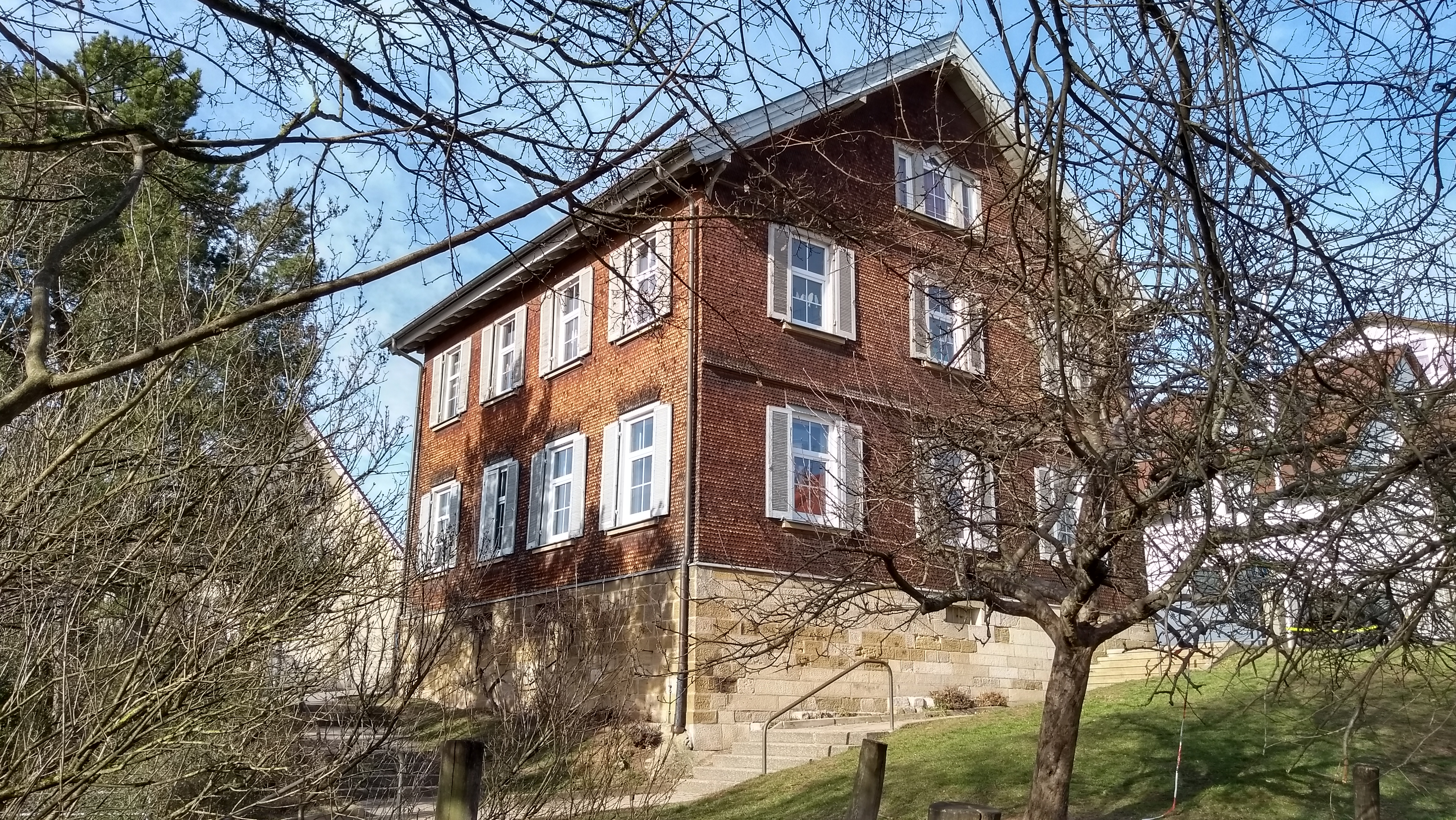 Alte Schule in Esslingen Liebersbronn